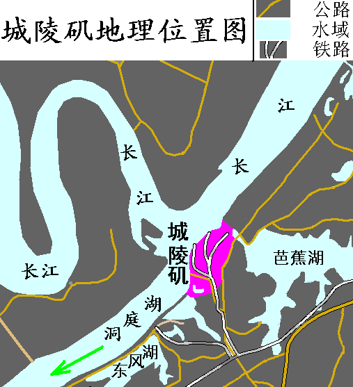 Lake Dongting；洞庭湖之长江出水口